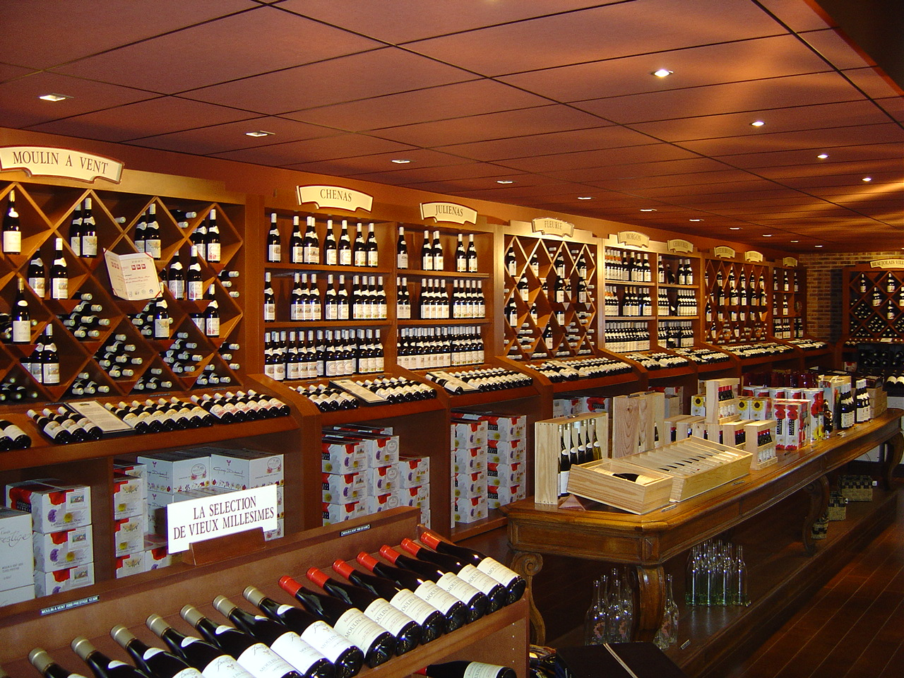 Vinothek im Hameau de Vin Foto von User.Ile-de-re, aufgenommen am 28.06.2006